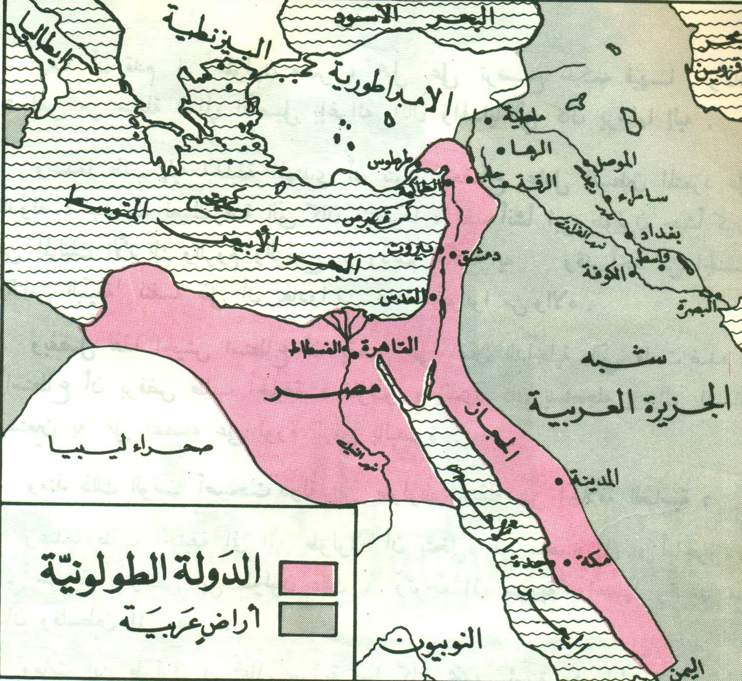 خارطة الدولة الطولونيَّة وما جاورها من الأراضي العبَّاسيَّة.